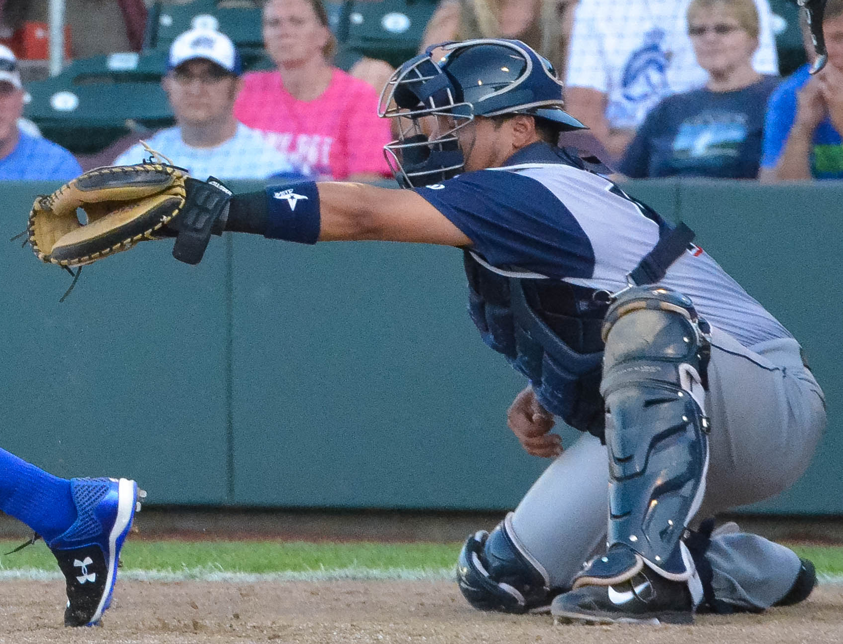 Juan Centeno